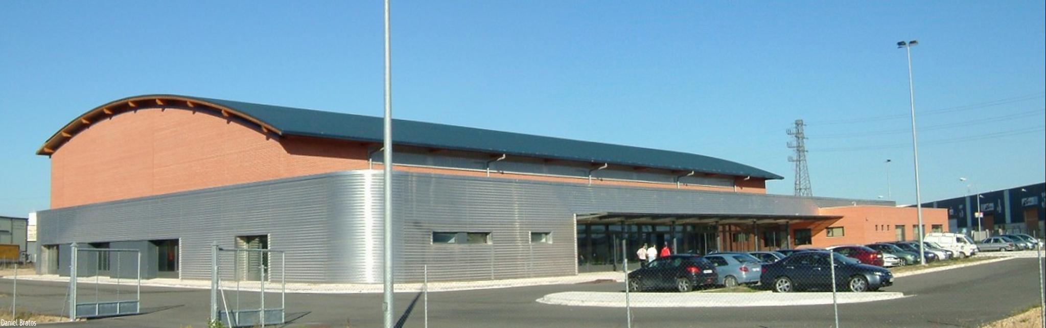 Pabellóm Multifuncional de Bayas